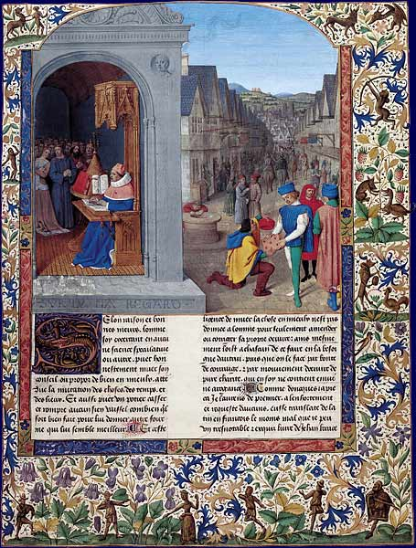 Boccace écrivant le De Casibus. Un messager remettant l'œuvre à Mainardo dei Cavalcanti Boccace, Des cas des nobles hommes et femmes Munich, Bayerische Staatsbibliotek, Cod. Gall. 6, fol. 10 Bayerische Staatsbibliothek München